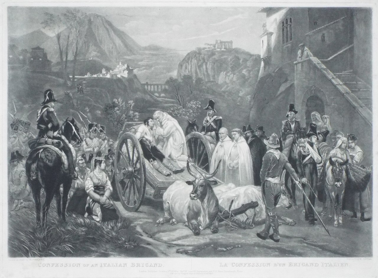 Stampa che riproduce il dipinto Confession of an Italian Brigand di Horace Vernet